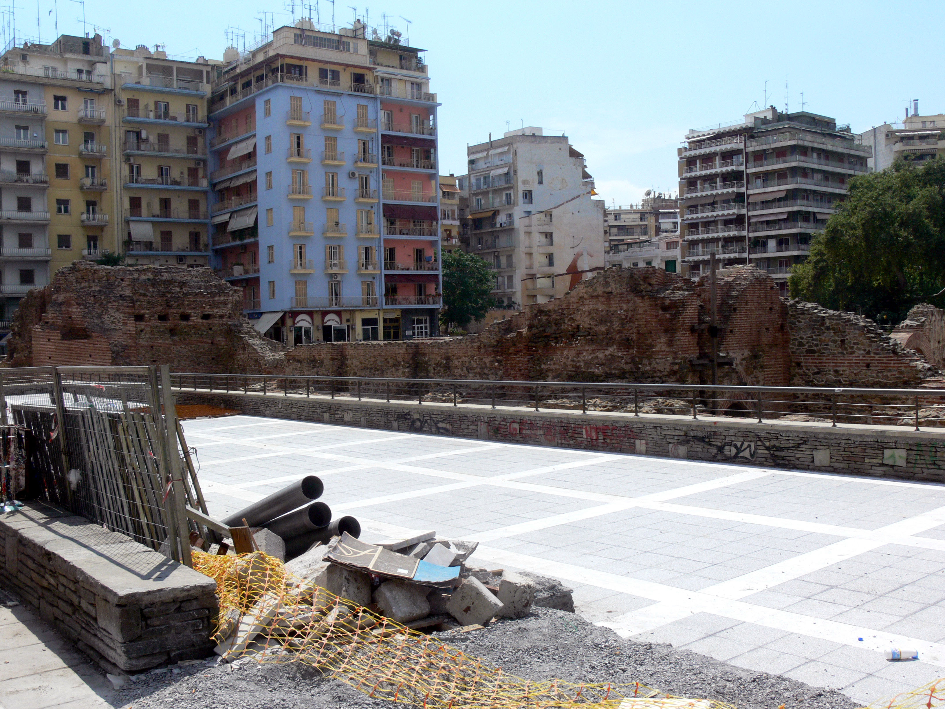 Tessaloniki. Platz des Galerius